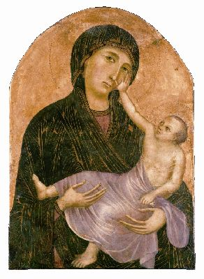 Madonna col Bambino, Tavola attribuita a Cimabue con la collaborazione del giovane Giotto. Oggi è esposta presso il museo di Santa Verdiana a Castelfiorentino